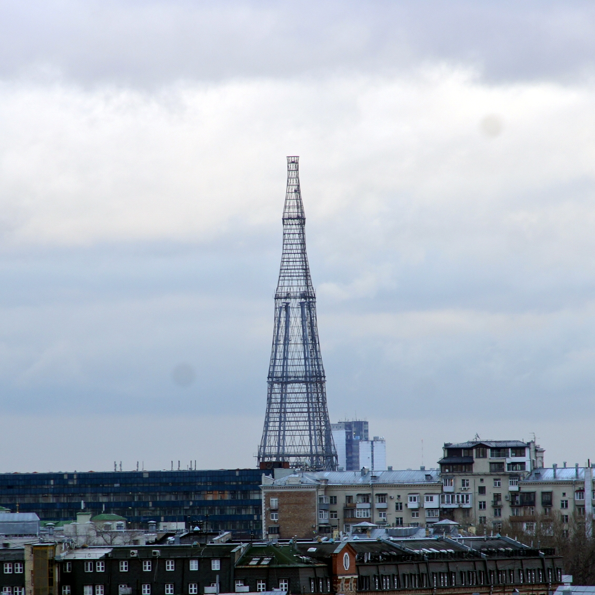 Реставрация Шуховской башни